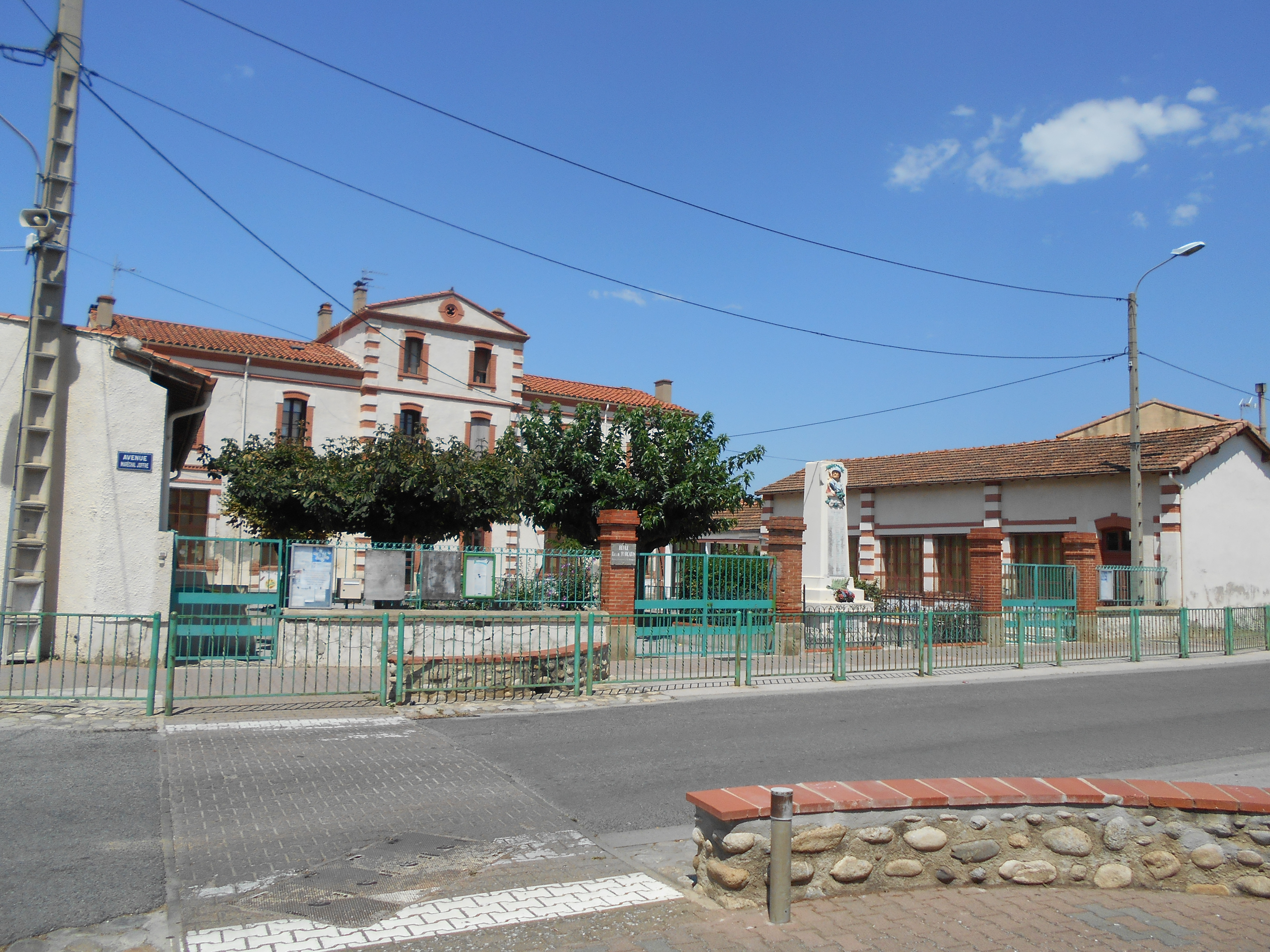 Escola Lluis Torcatis, de Bulaternera